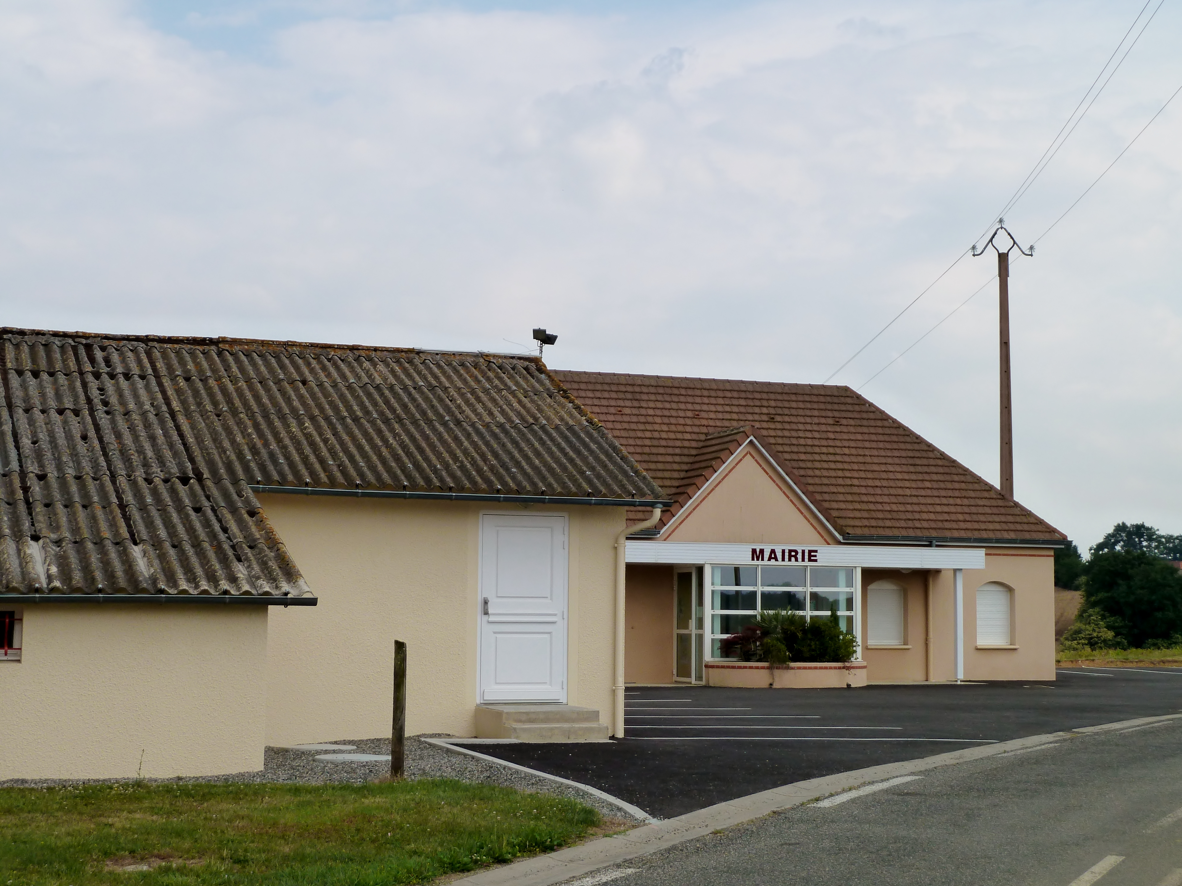 Mairie de Luc-Armau